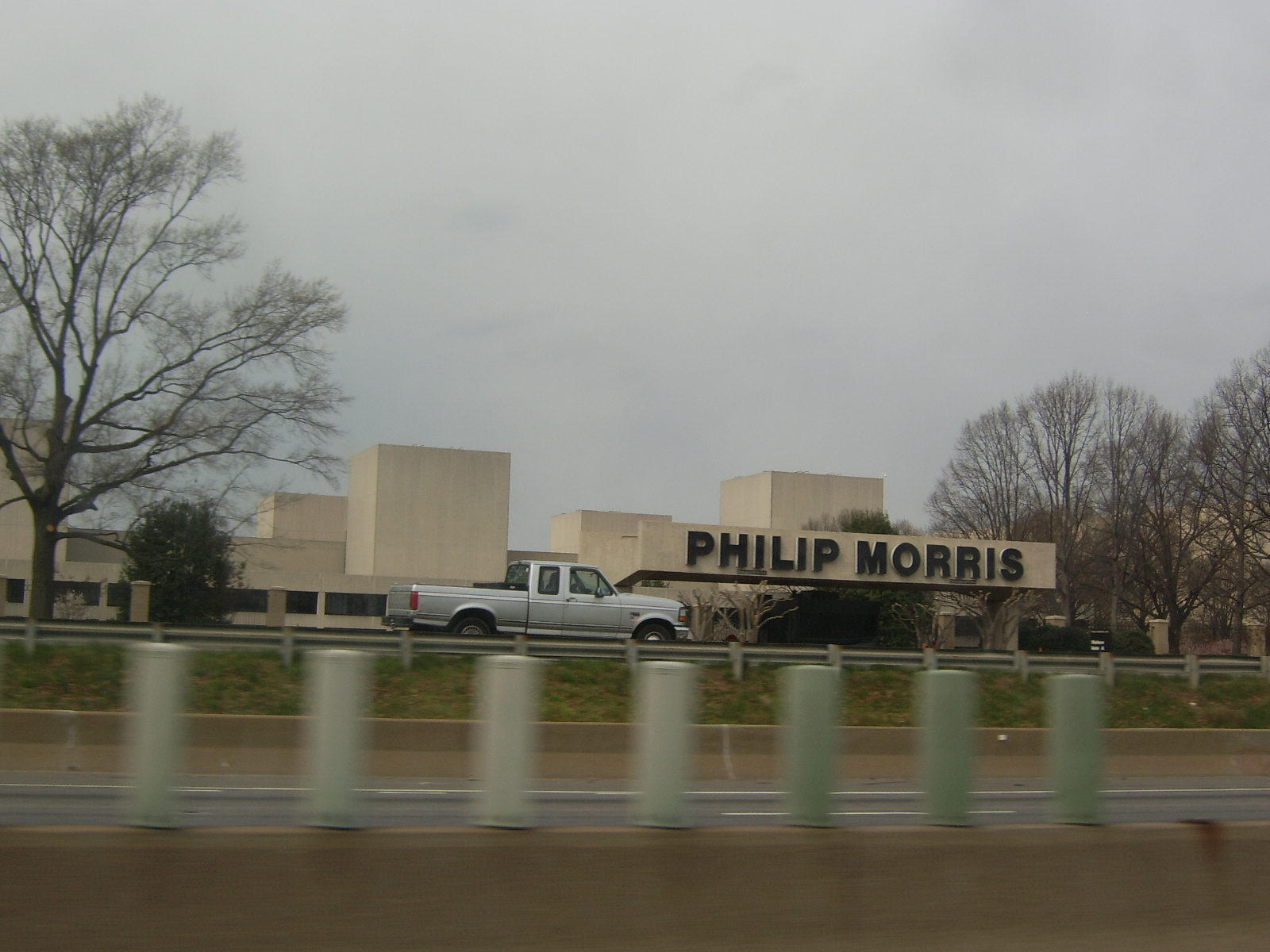 STA60316